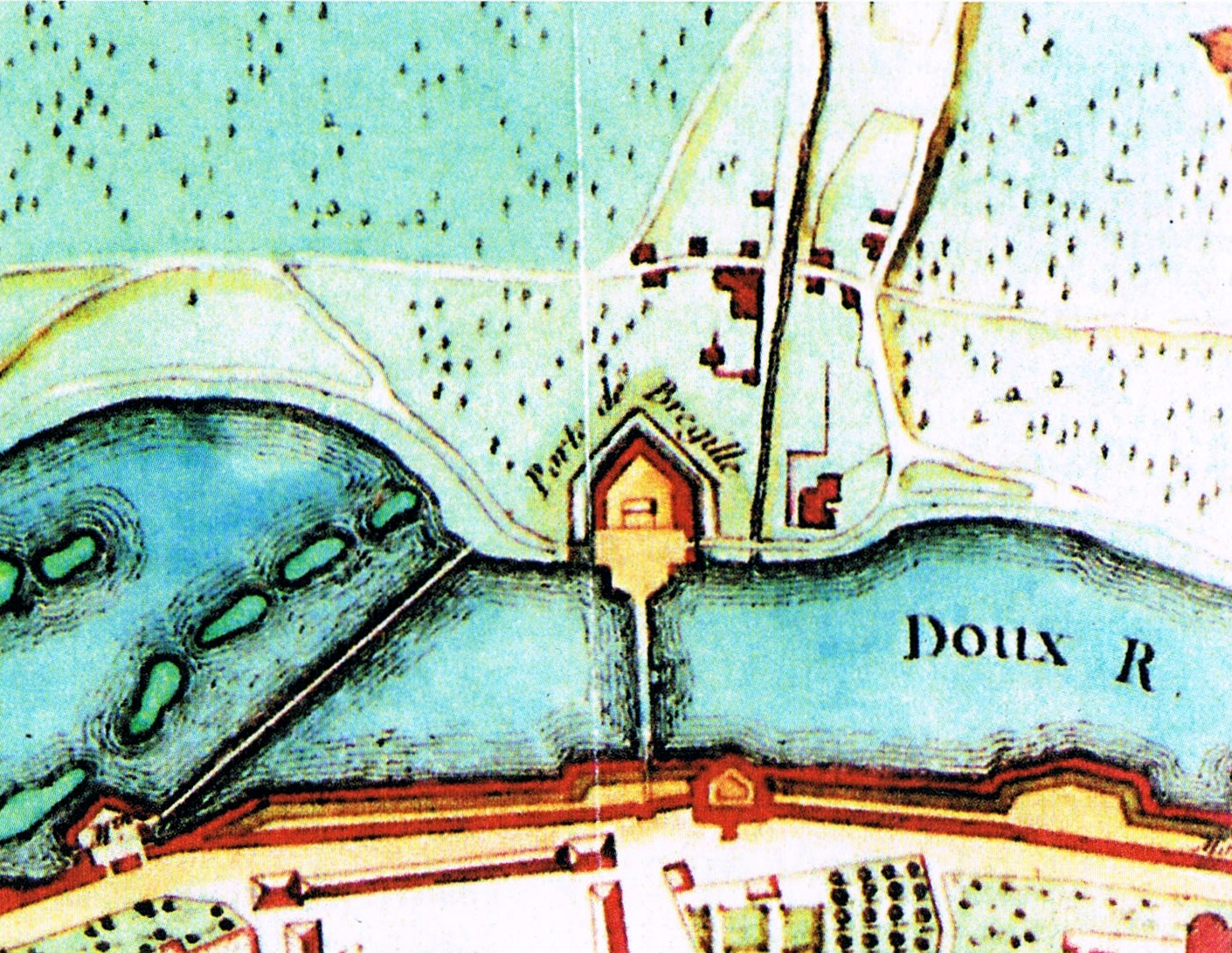 Détail d'un plan de Besançon montrant la porte de Bregille, par "Le rouge" en 1752.